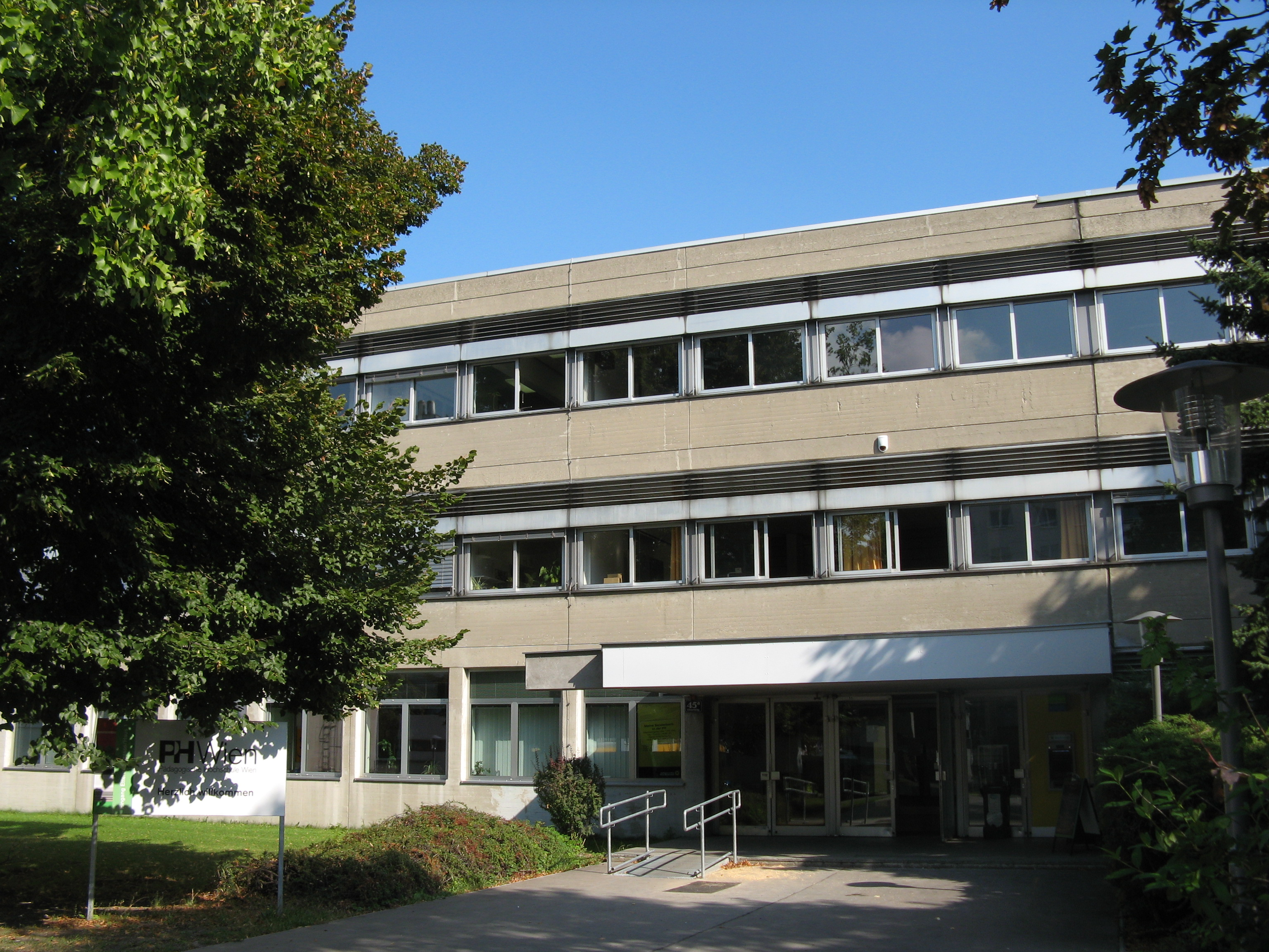 Pädagogische Akademie (1968) von Karl Leber und Heinrich Matha, Ettenreichgasse 45, Wien-Favoriten